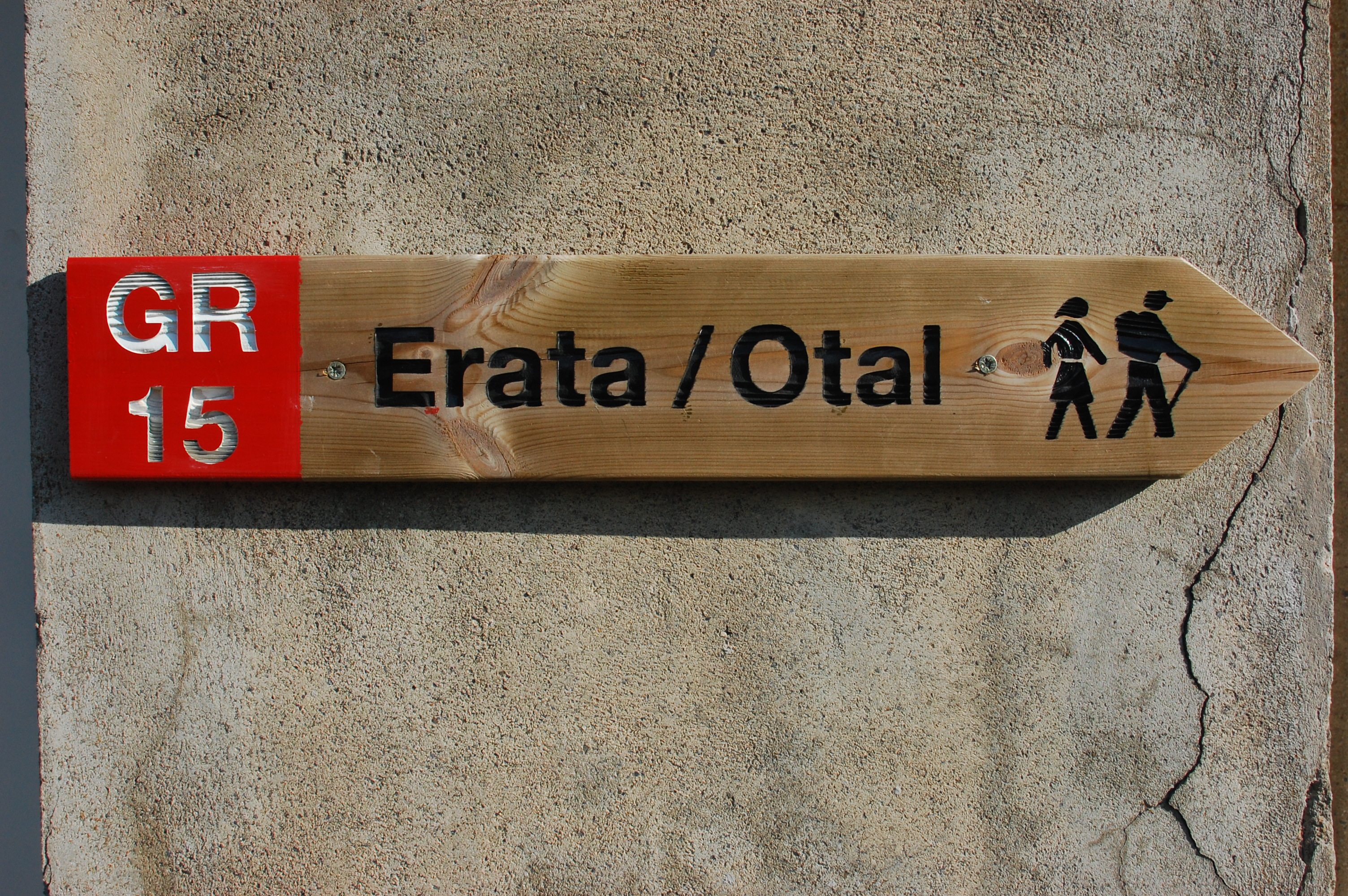 Aragonés: GR 15 Erata/Otal